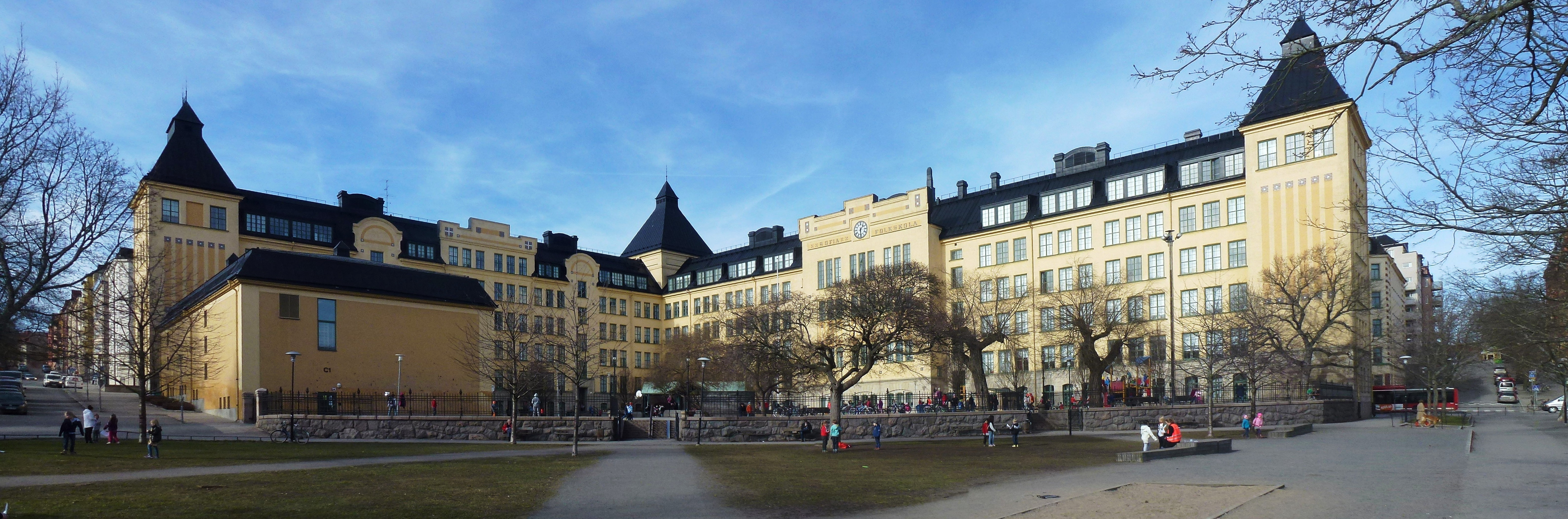 Sofia Folkskola